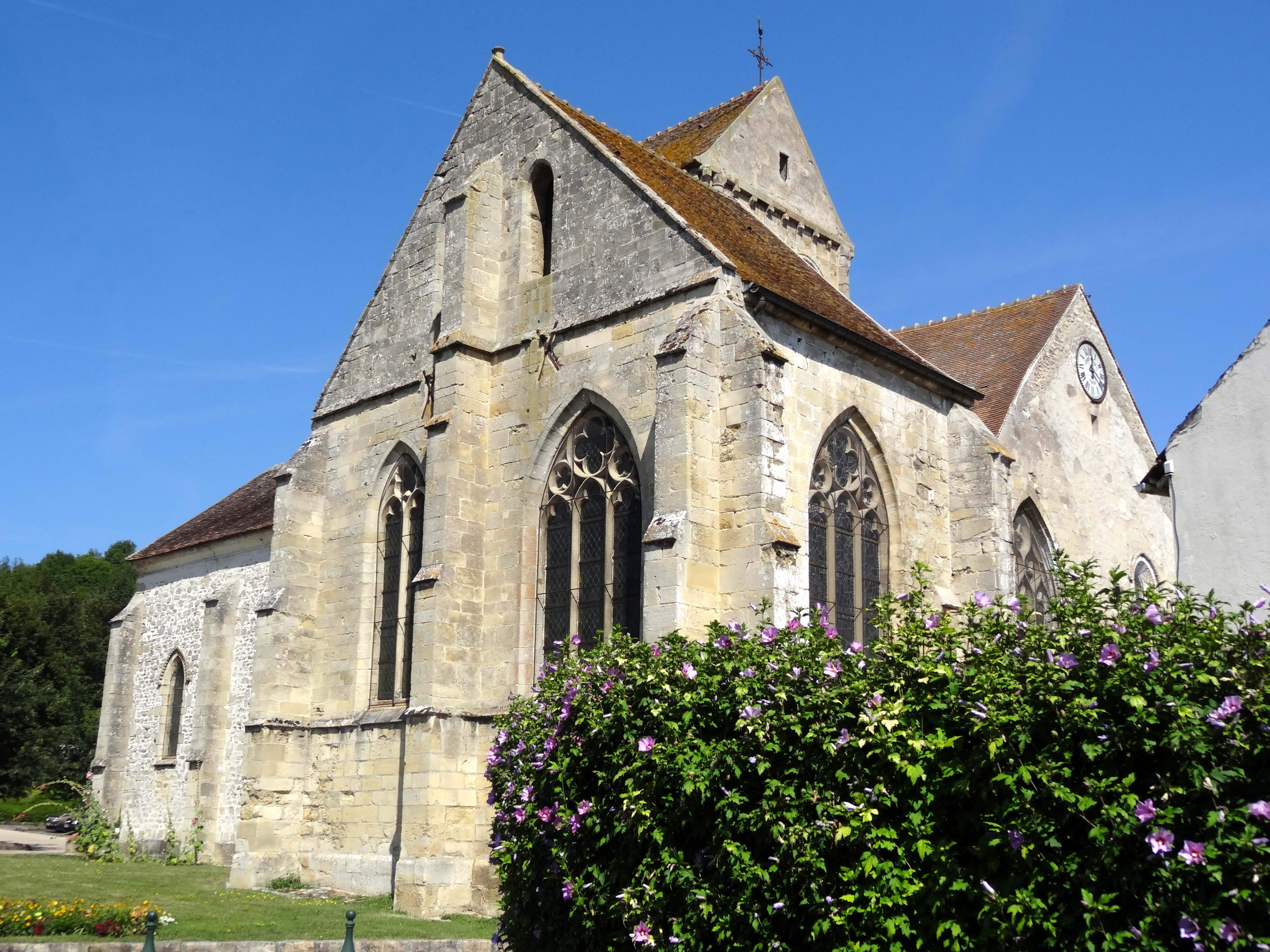 Église Saint-Sulpice de Seraincourt - voir titre.